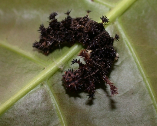 Limenitis procris caterpillar